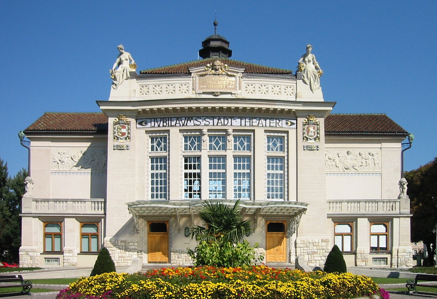 Jubiläums-Stadttheater, Klagenfurt.